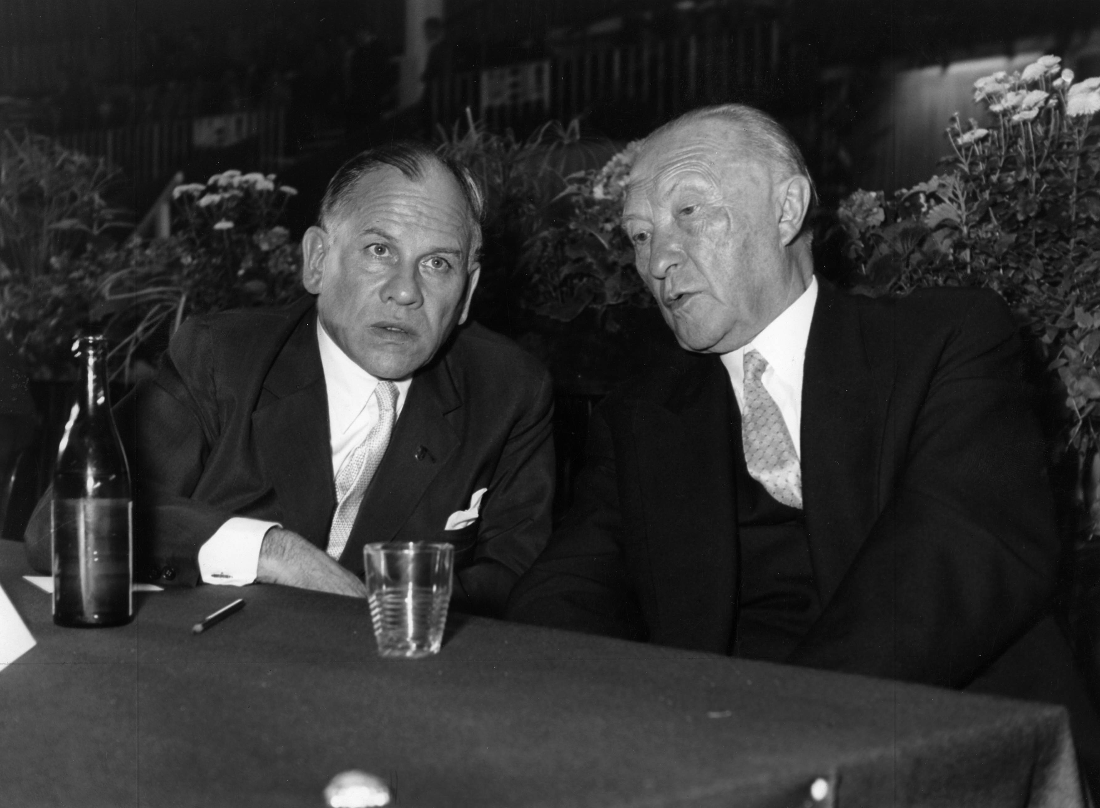 Adenauer, Konrad 8. CDU-Bundesparteitag, 18.09.1958 - 21.09.1958